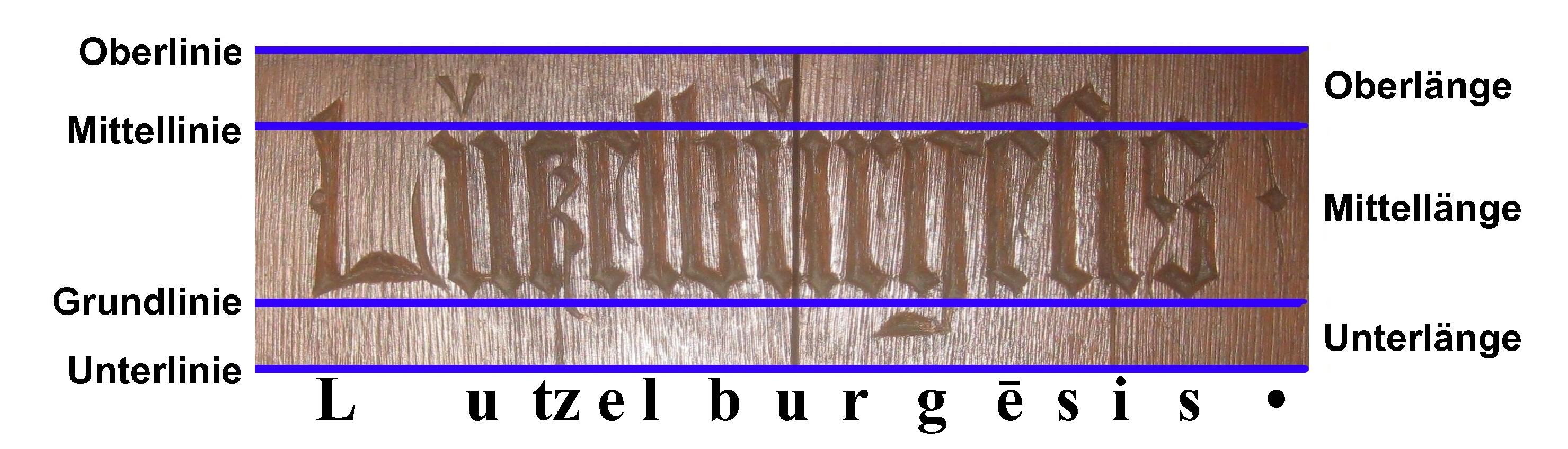 Lineatur mit dem Ortsnamen „Lutzelburgēnsis“ in gotischer Minuskel. Inschrift vom Chorgestühl der Leonhardskirche in Stuttgart, Südostfassade, vordere Sitzreihe, linke Hälfte, Rücklehne von Sitz 7.